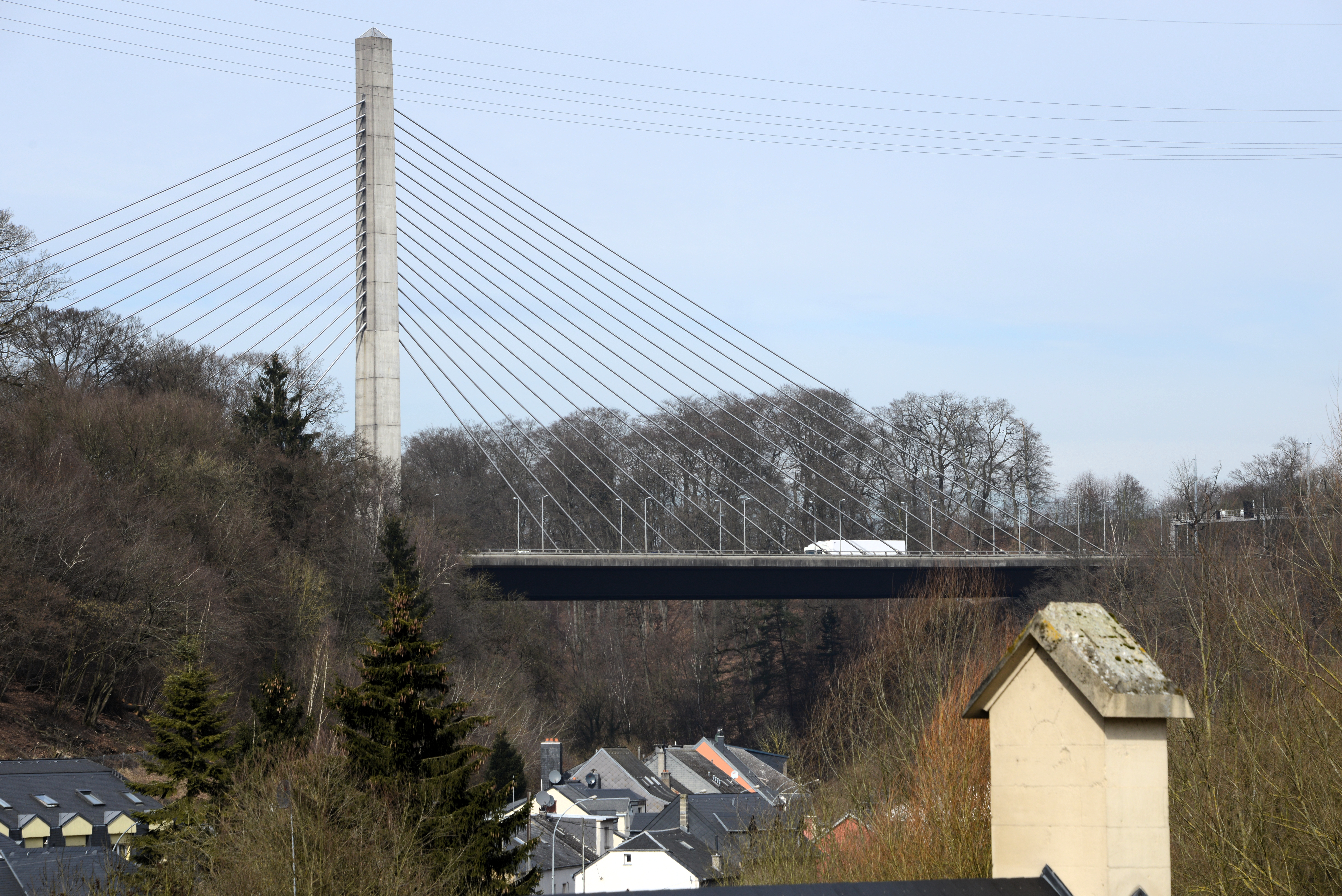 D'Victor-Bodson-Bréck vun der Hesper Buerg gesinn.